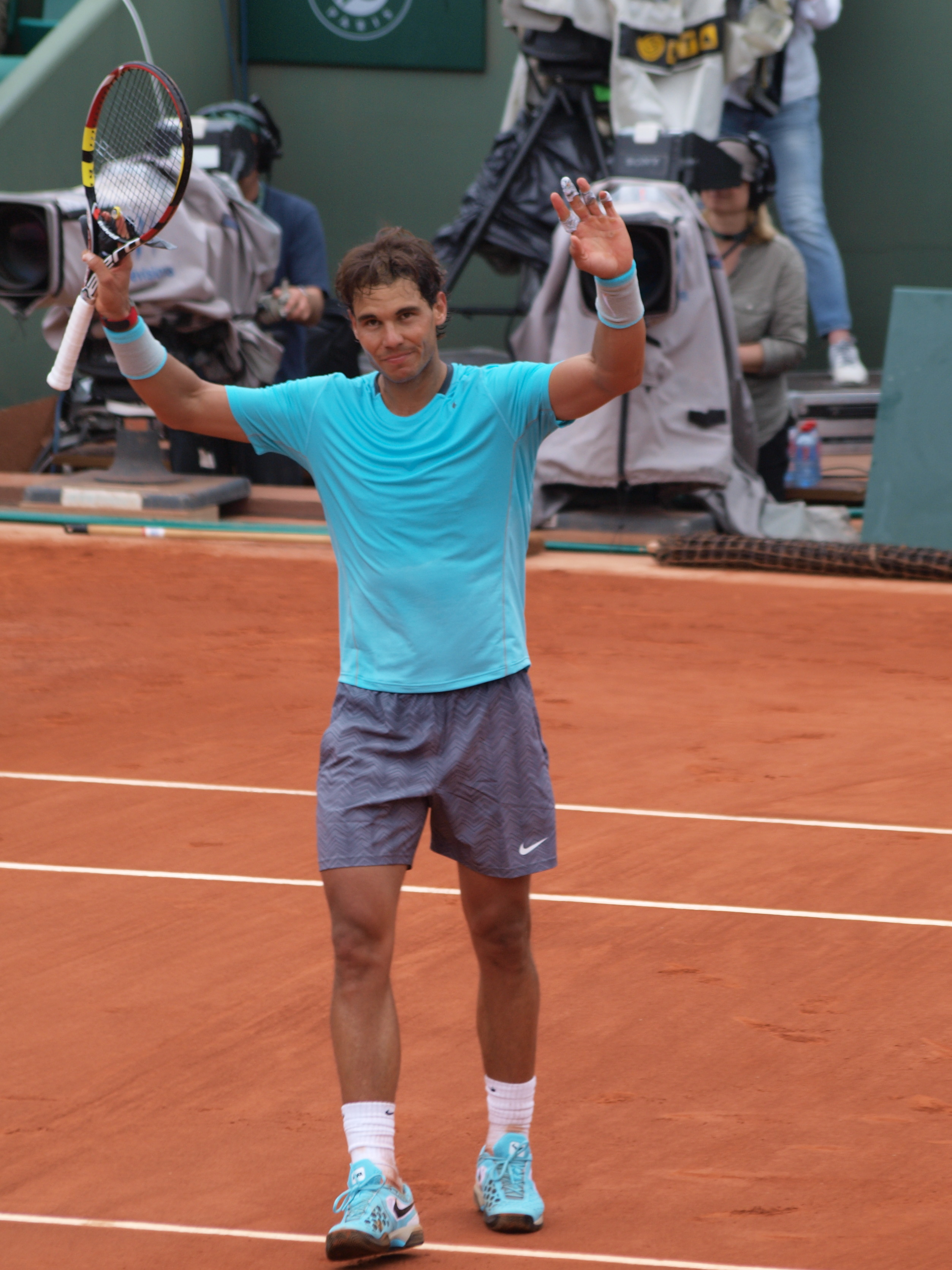 Internationaux de France de tennis, le 2 juin 2014, sur le court Philippe Chatrier : Raphaël Nadal